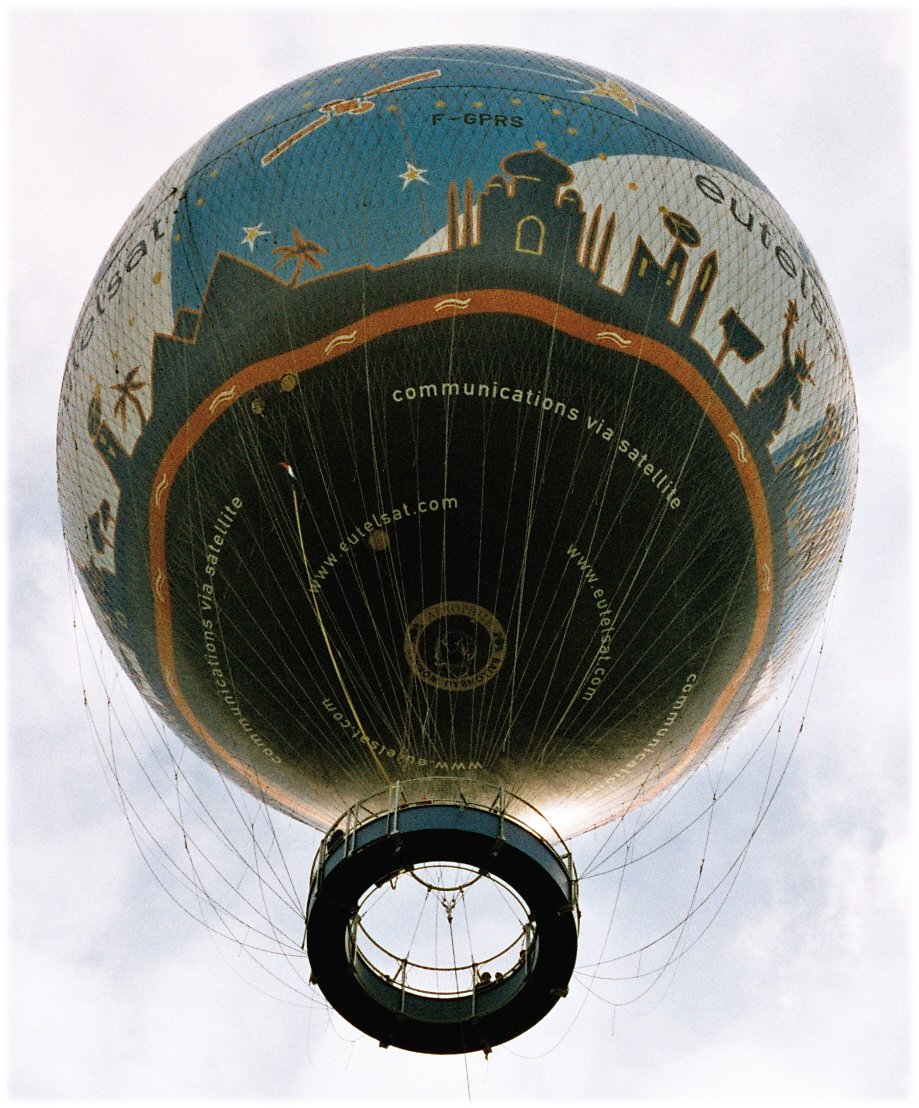 Une photo du ballon captif du parc André-Citroën, dans le 15e arrondissement de Paris.